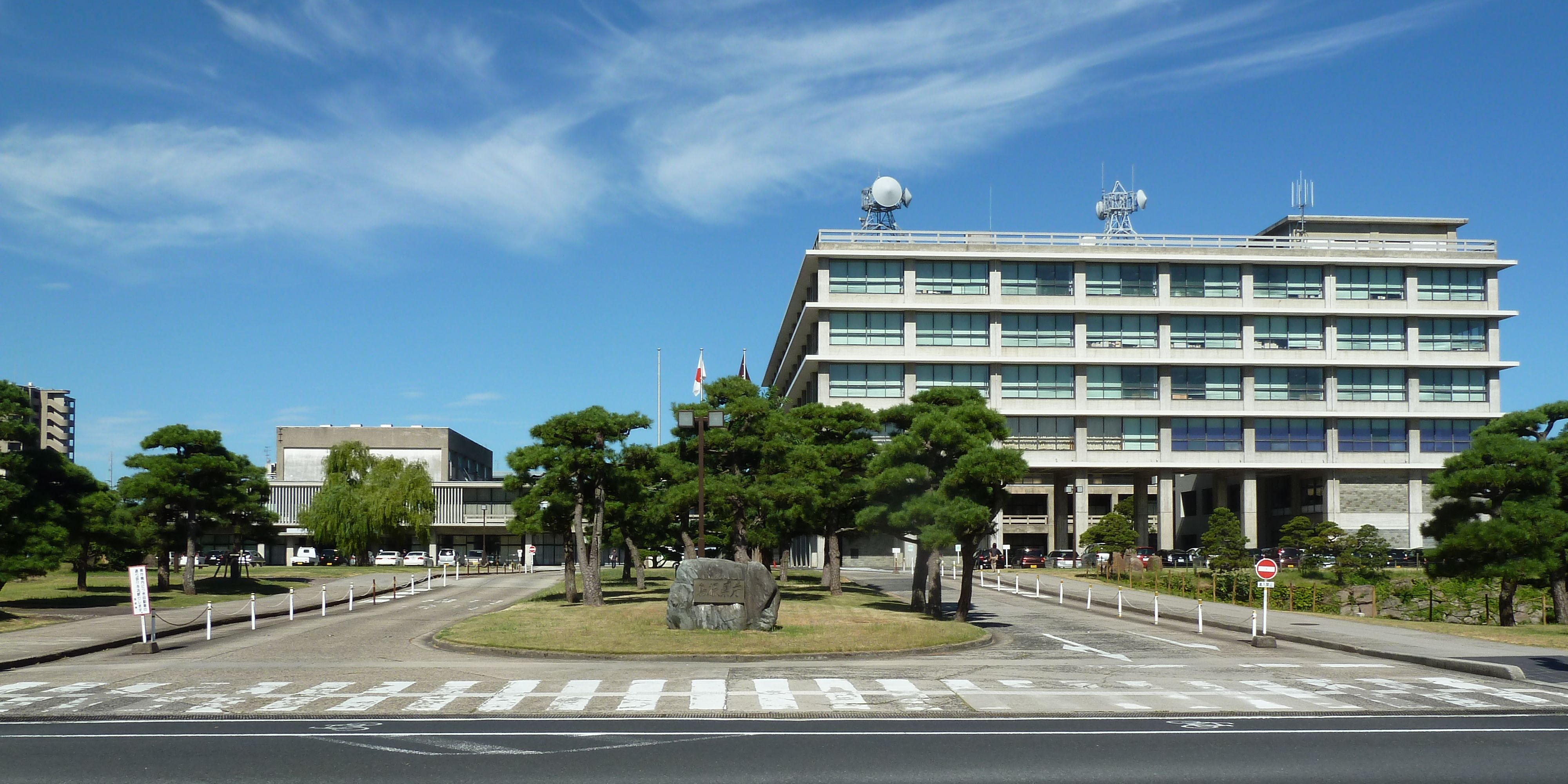 島根県庁舎